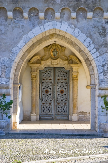 Portal, Santuario di Santa Maria del Piano, Ausonia, Lazio